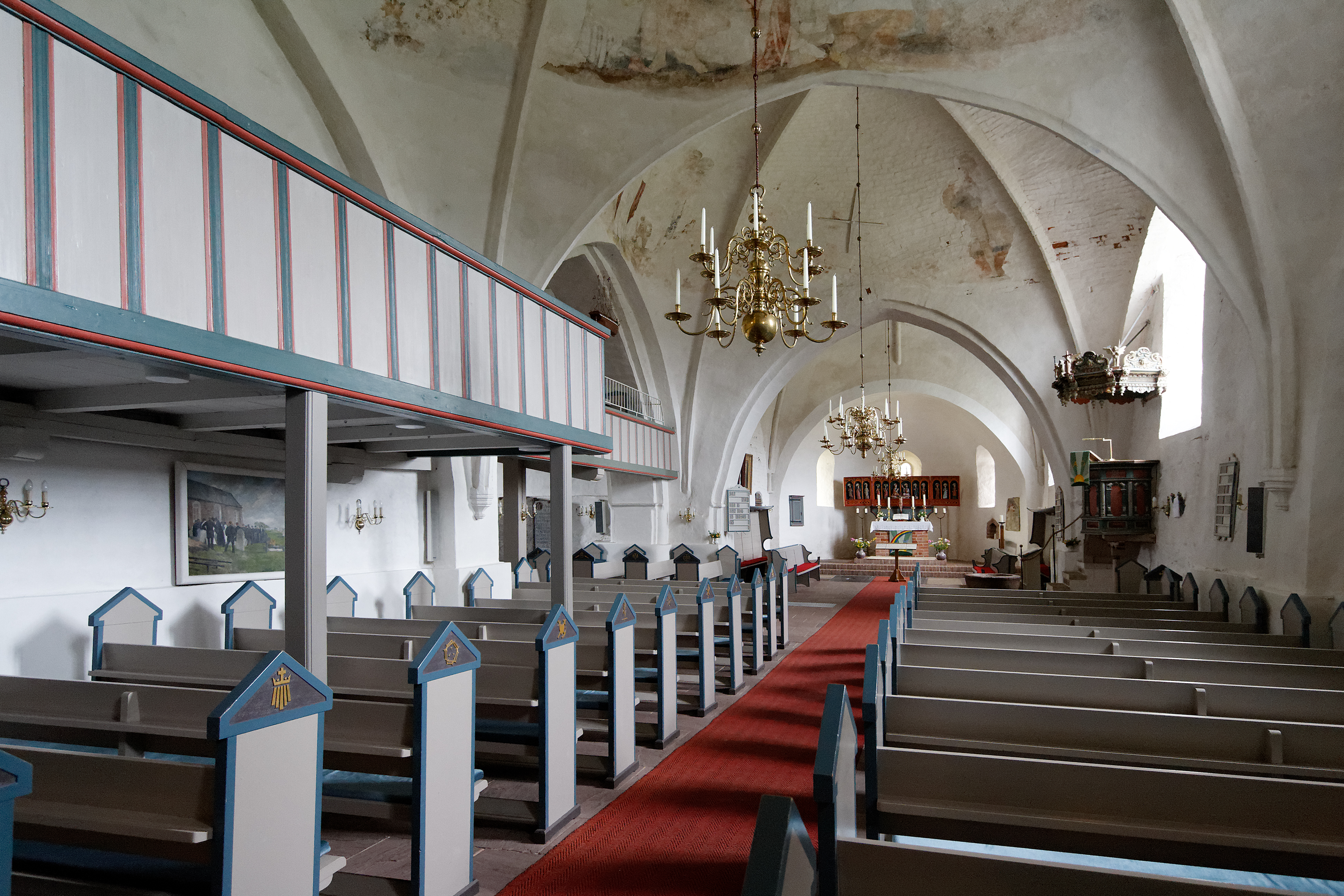 Kirche St. Laurentii in Süderende, Insel Föhr